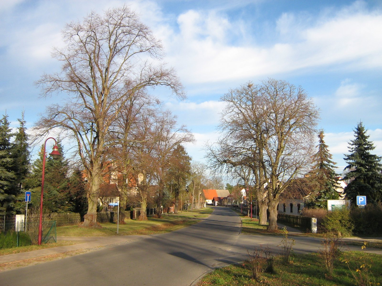 Dorfstrasse in Köthen, einem Ortsteil der Stadt Märkisch Buchholz, Landkreis Dahme-Spreewald, Brandenburg.